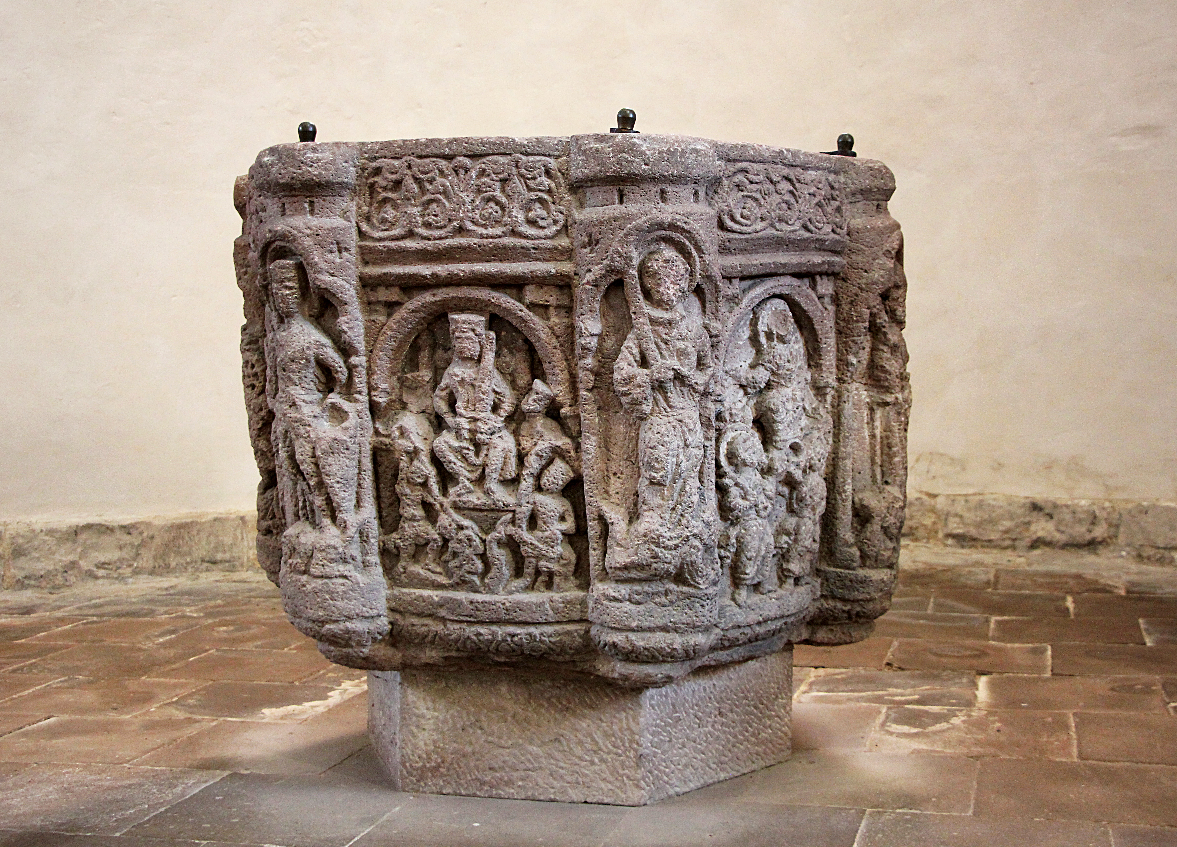 Spätromanischer Taufstein (um 1220) in der Kirche des ehemaligen Benediktinerinnen-Klosters Lippoldsberg.